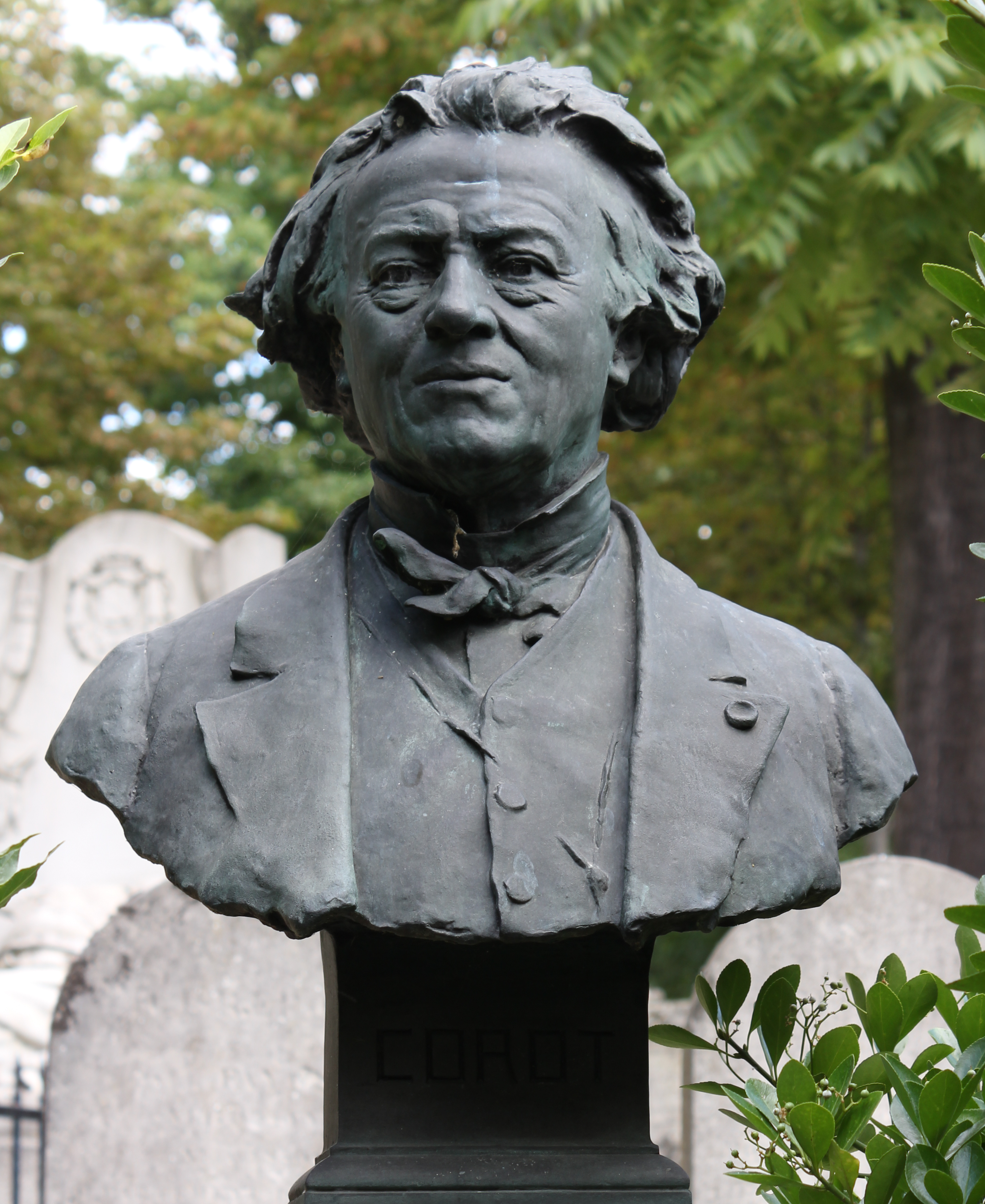 Sépulture de Jean-Baptiste-Camille Corot (1796-1875), peintre et graveur. Tombe ornée d'un buste en bronze de Béguine.